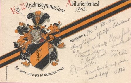 Couleurkarte des Königsberger Wilhelmsgymnasiums